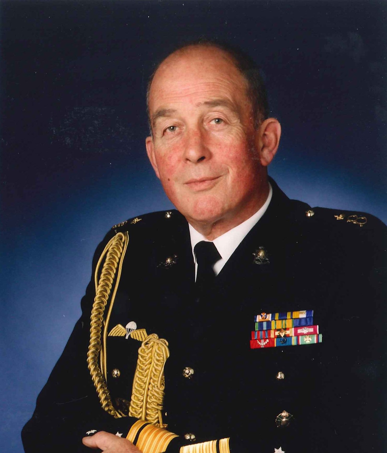 H.G.B. van den Breemen, generaal b.d.